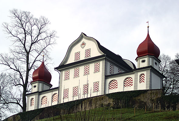 Landenberg Sarnen, Schweiz (27. 12. 2002)